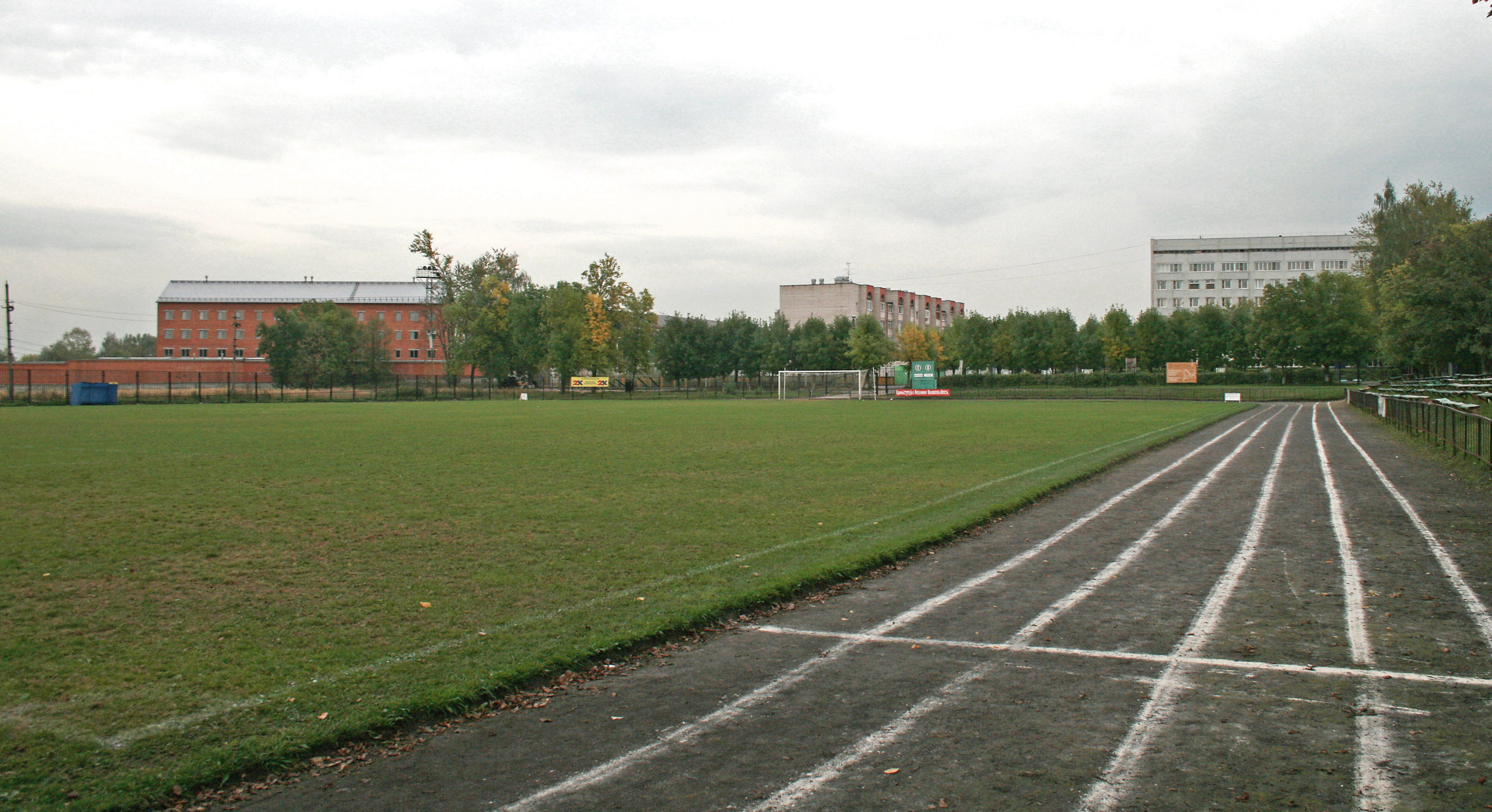 Стадион «Труд» в городе Ивантеевка Московской области.